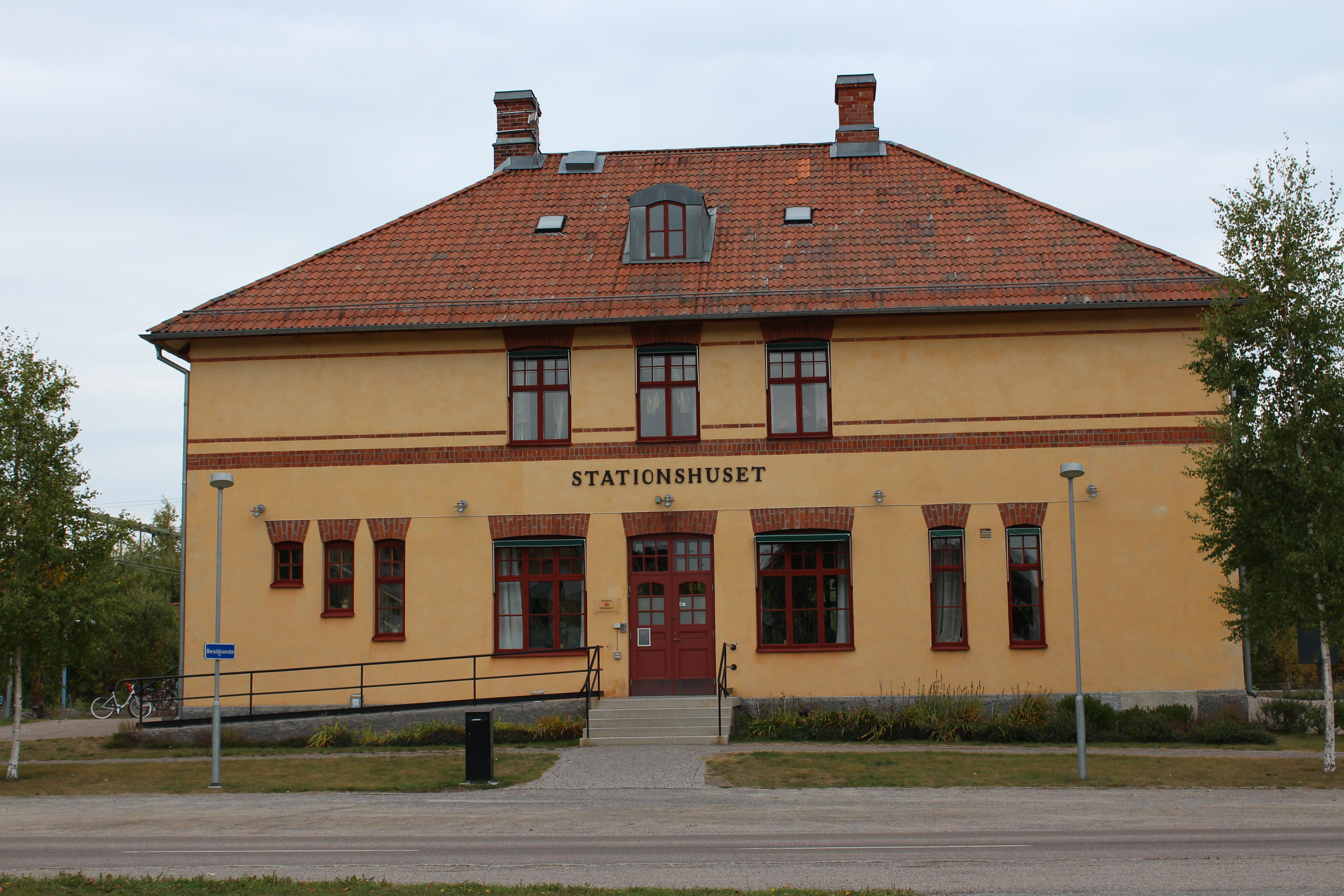 Stationshus, Heby